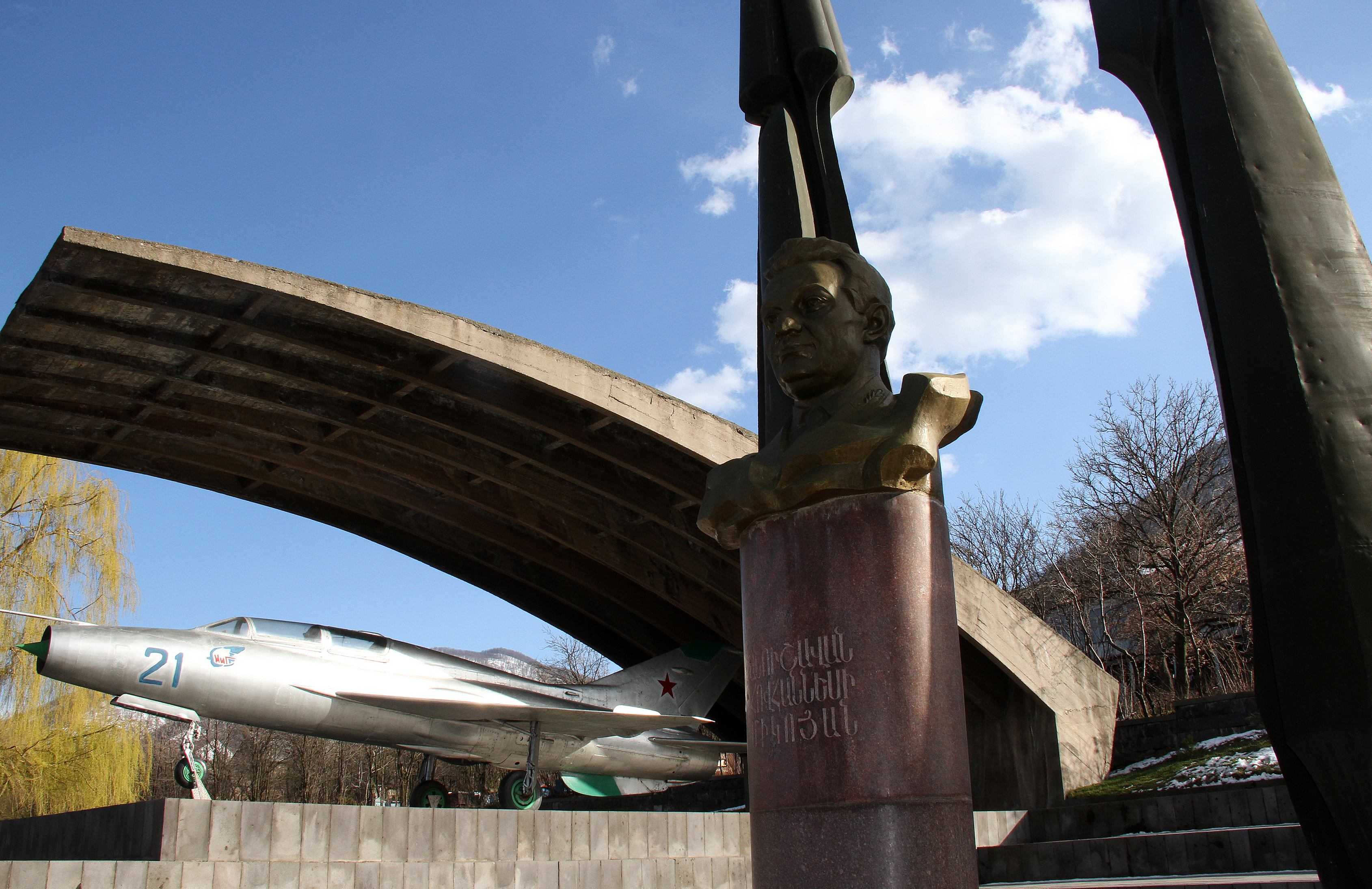 MiG 21 und Büste zum Gedenken an den Fluzeugkonstrukteur Artjom Iwanowitsch Mikojan in seinem Heimatdorf Sanahin in Armenien